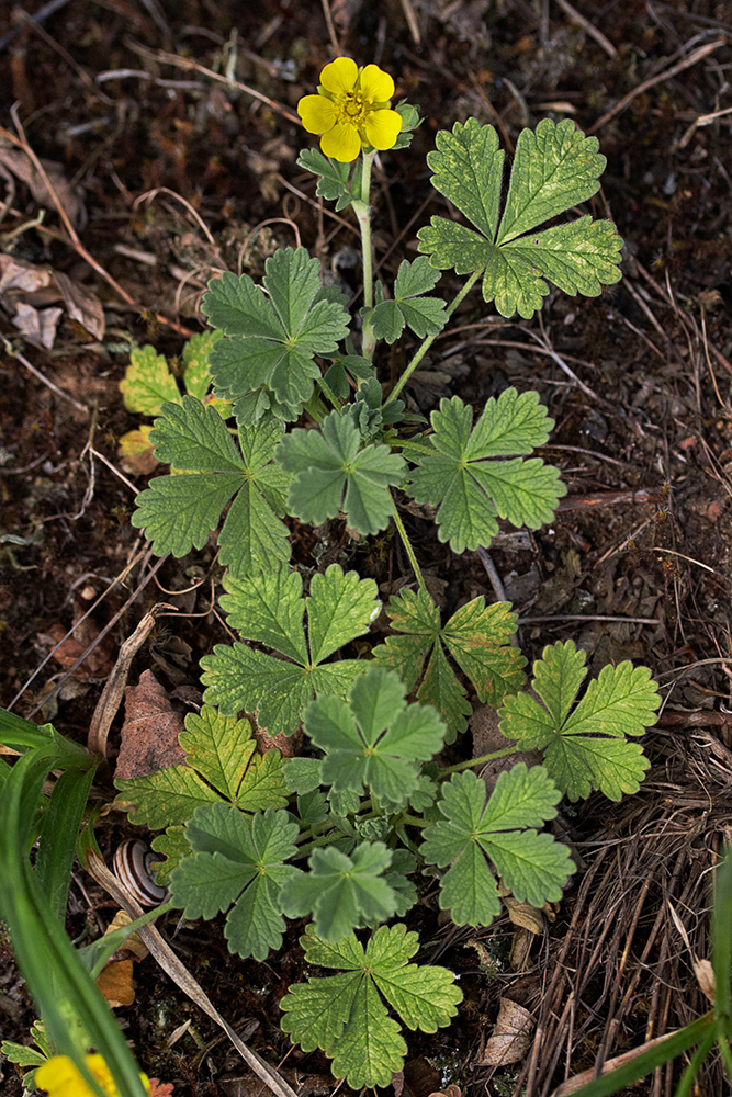 Potentilla arenaria, Sand-Fingerkraut